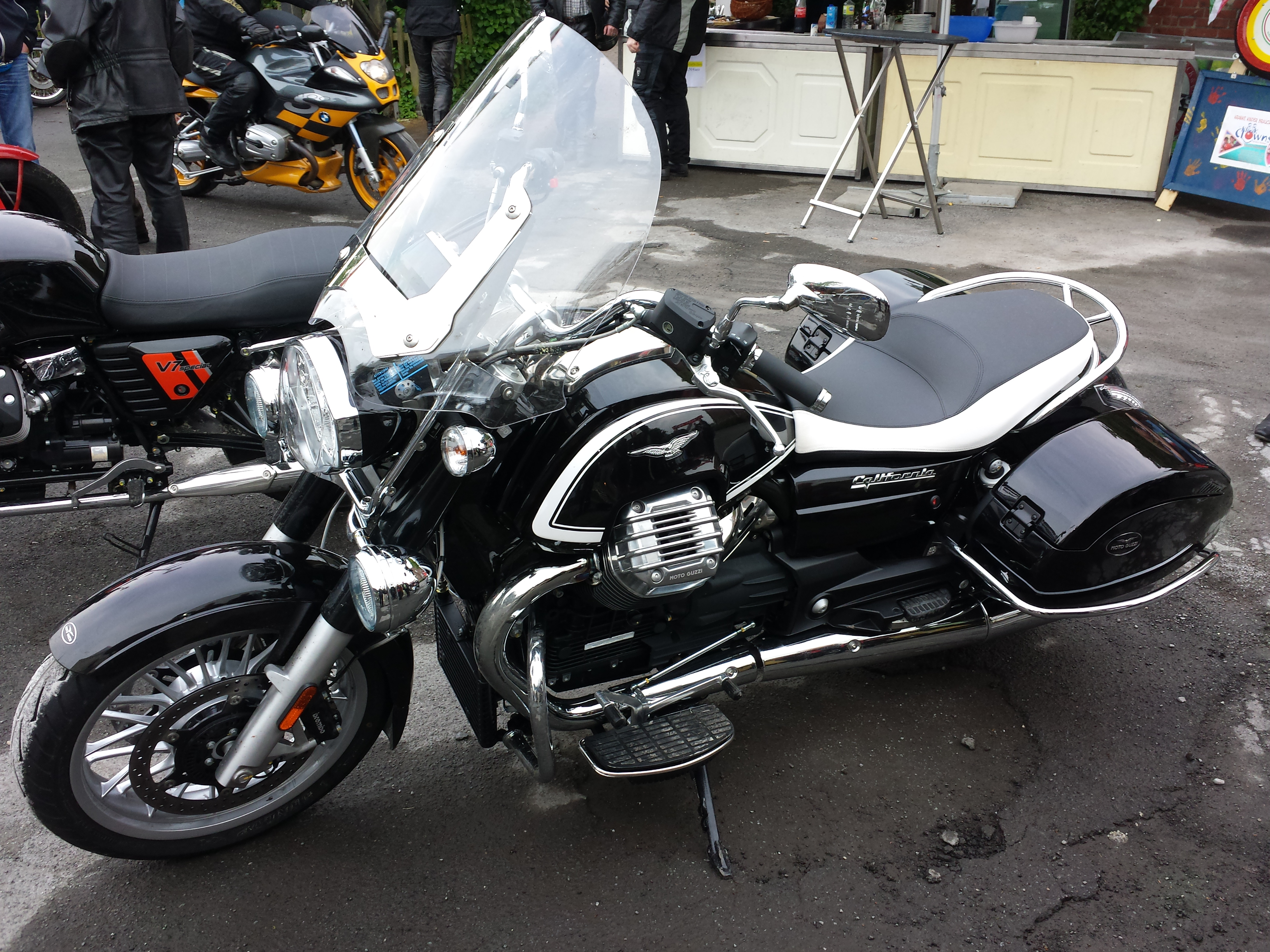 Moto Guzzi California mit 1400 cm aus dem Jahr 2014